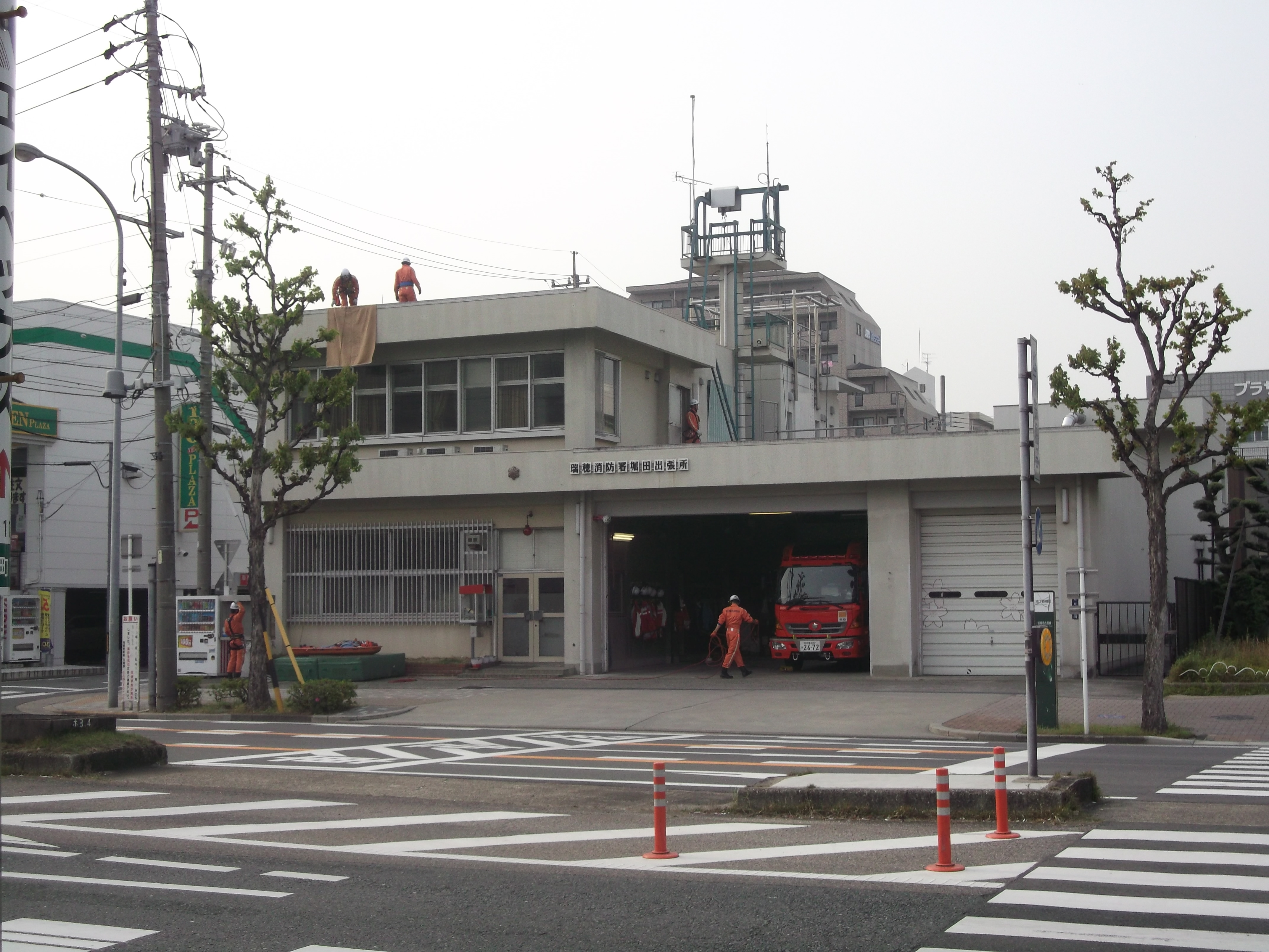 名古屋市瑞穂区の名古屋市消防局瑞穂消防署堀田出張所を南側公道より撮影